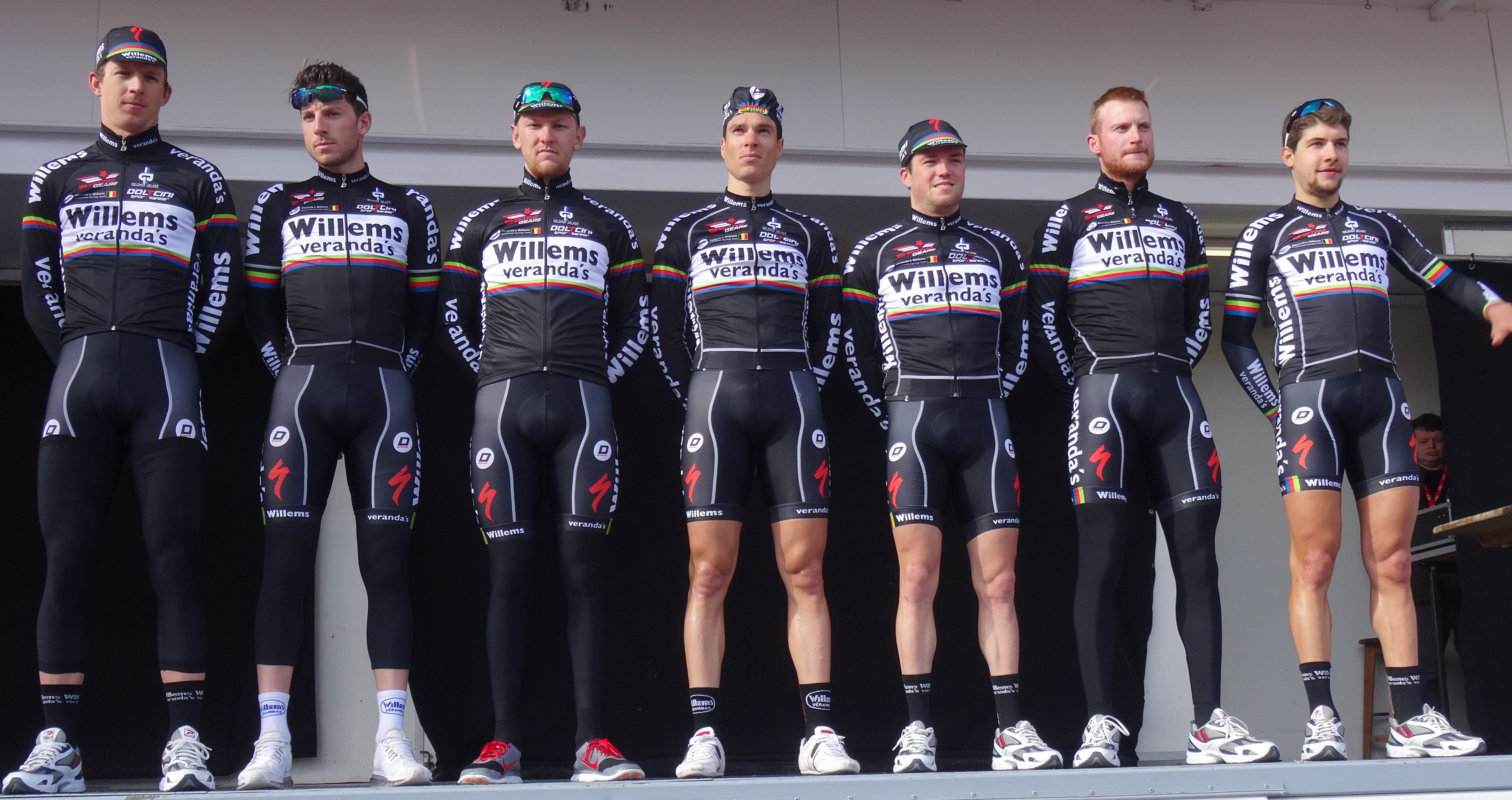 Reportage réalisé le mercredi 4 mars à l'occasion du départ du Samyn des Dames 2015 et du Samyn 2015 à Quaregnon, Belgique.